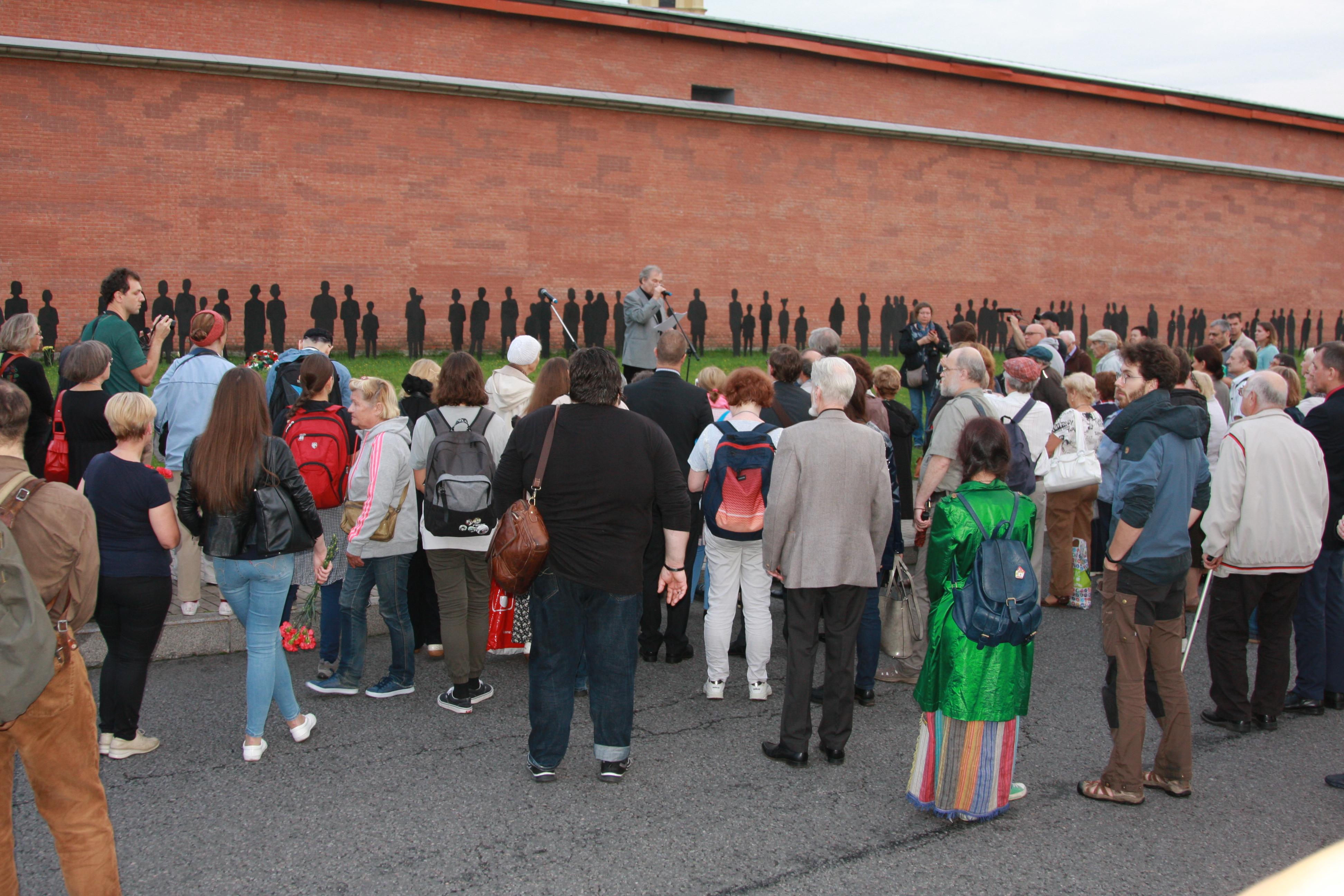 Акция 5 сентября 2018 года у Головкина бастиона Петропавловской крепости, посвященная 100-летию объявления Красного террора, организованная Петербургским обществом «Мемориал» и Государственным интерьерным театром.